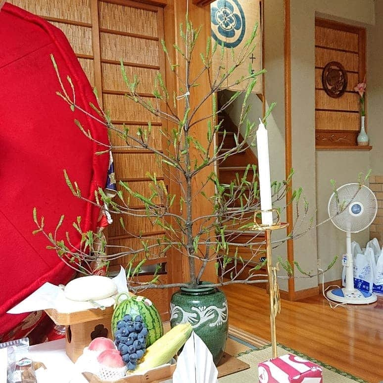 2019年7月頃の様子